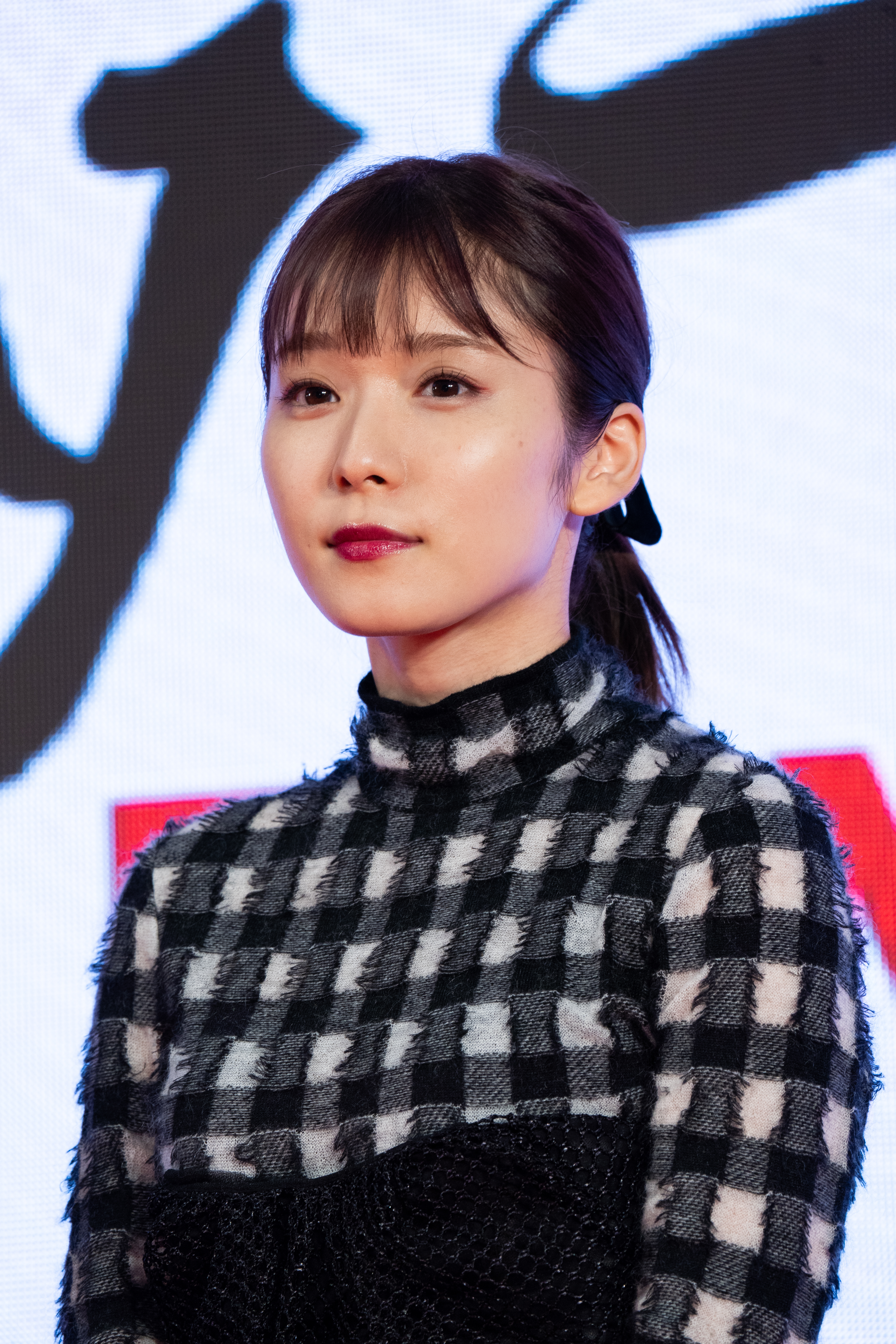 第32回 東京国際映画祭 オープニングセレモニー 松岡茉優 (ひとよ)